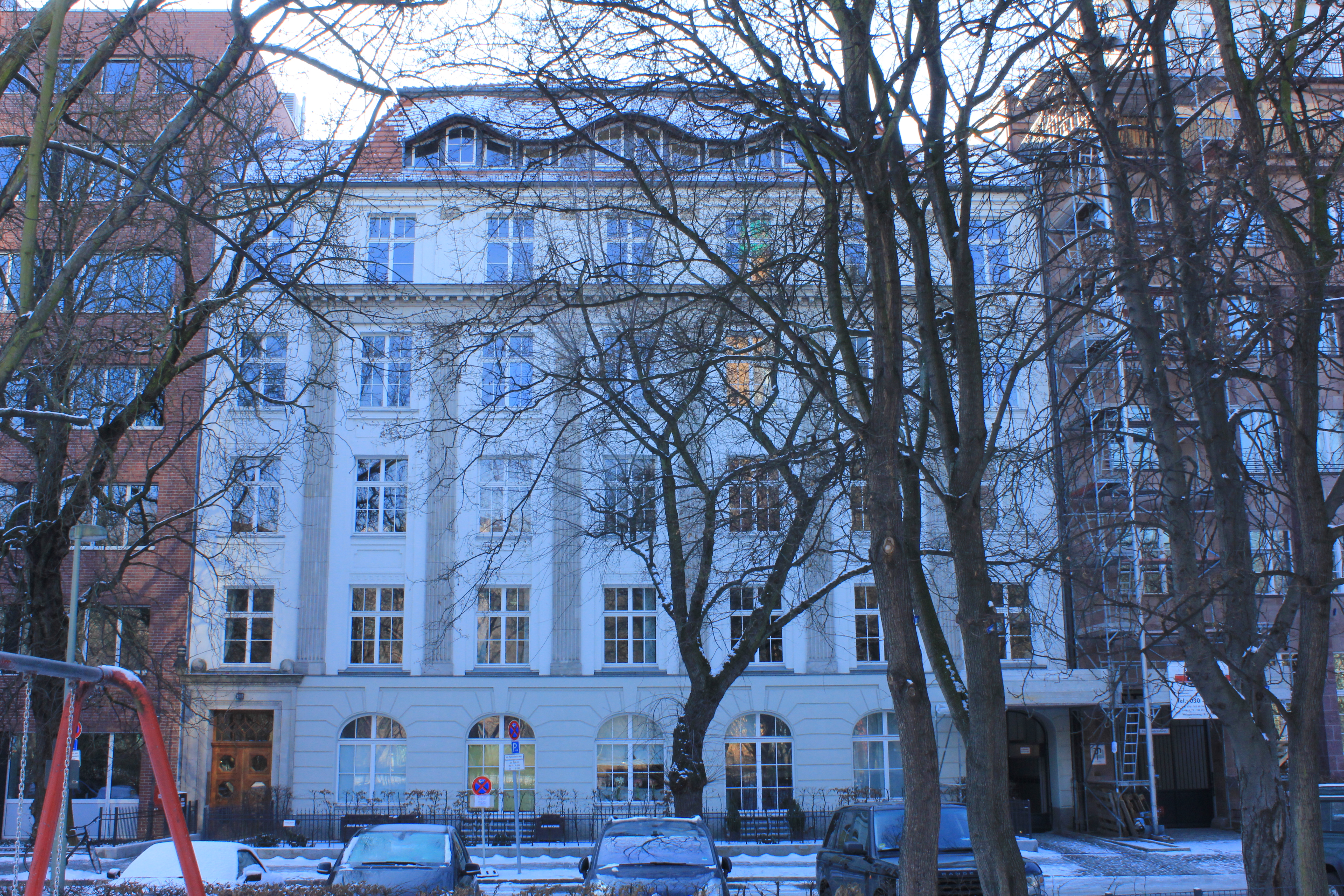 1910-11 von Franz Hildebrandt